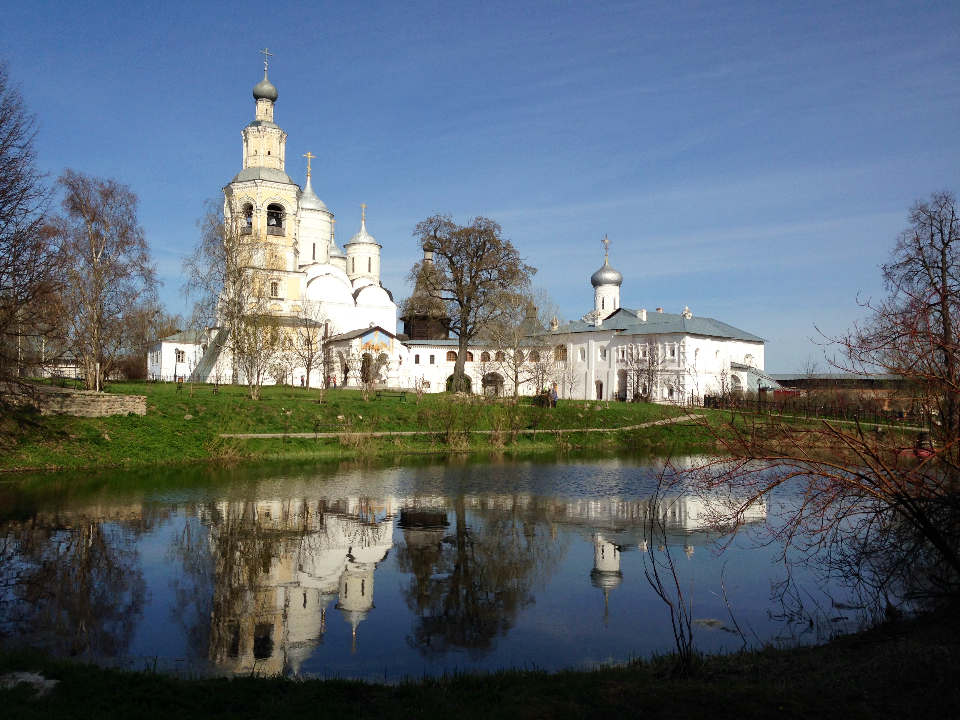 Вологда, Вологодская область